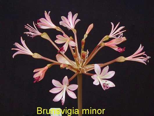 Brunsvigia minor: Blüte